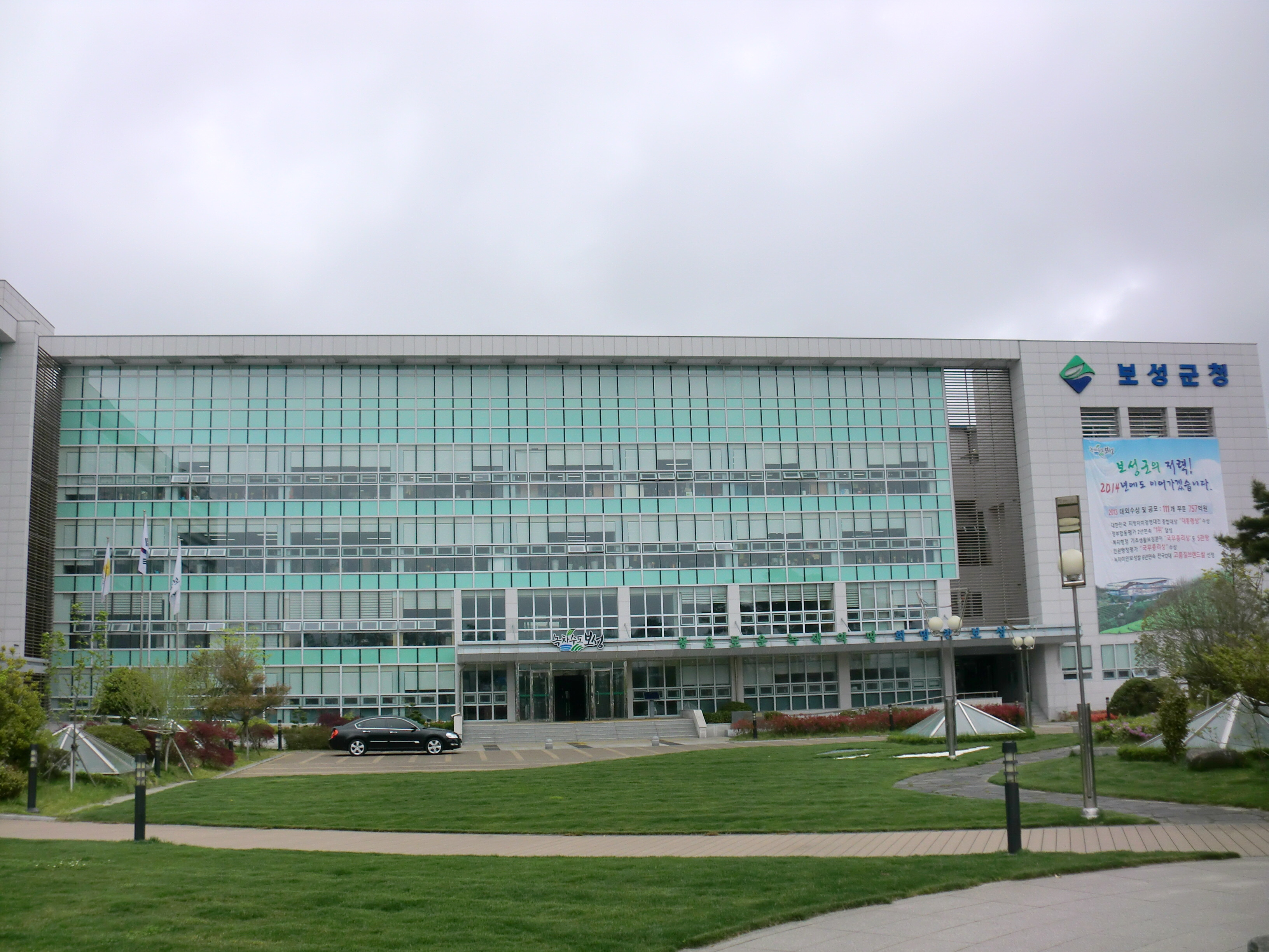 전라남도 보성군에 있는 보성군청